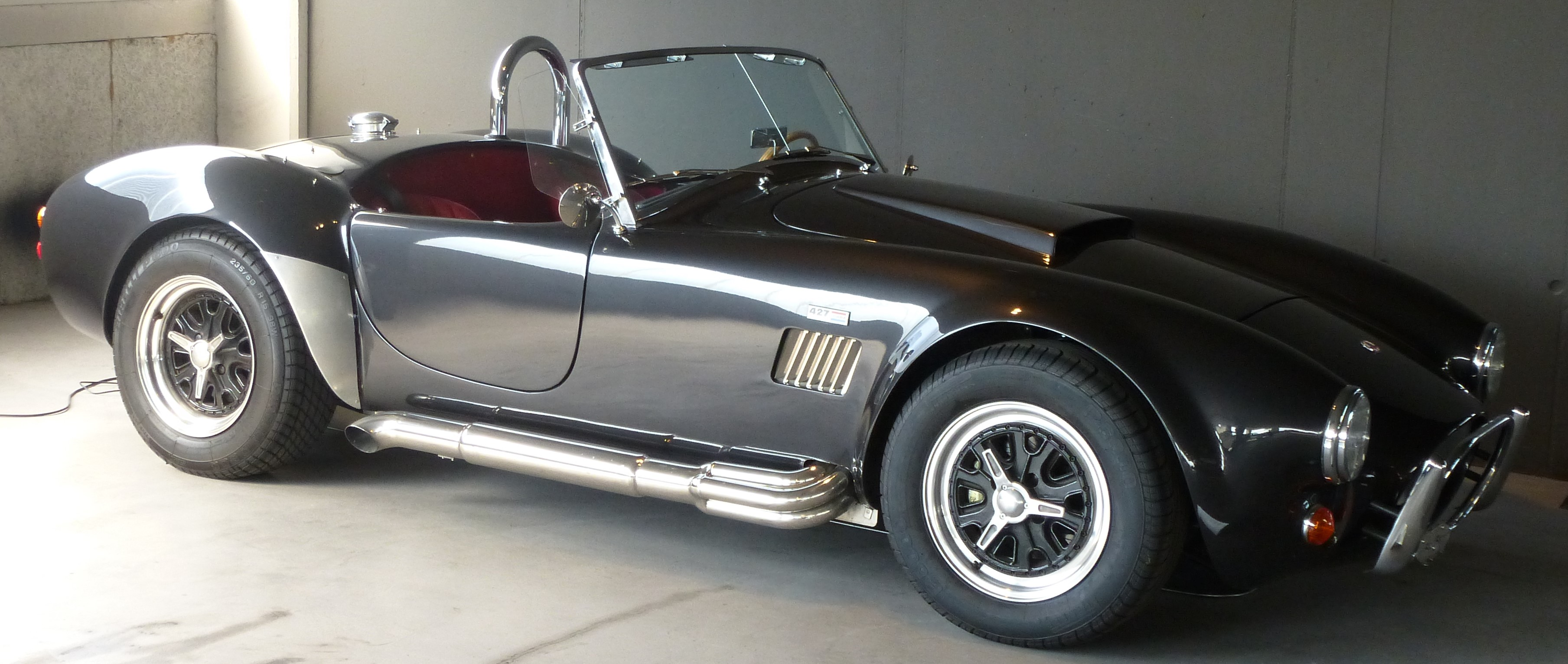 HS Cobra